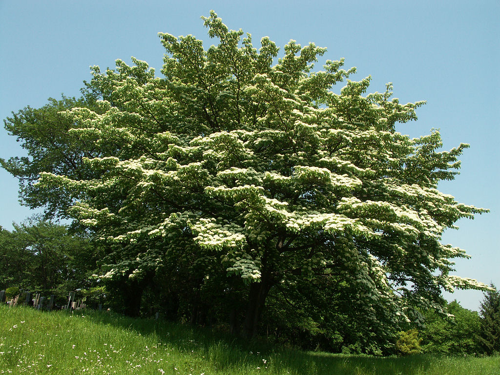 一斉に花が咲き、ミツバチが集まってきている。